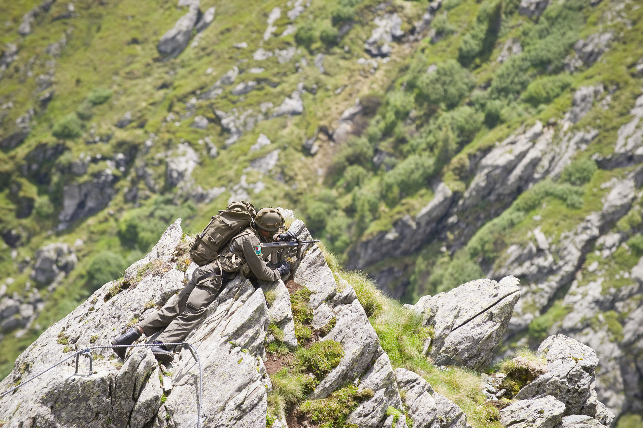 Ein Gebirgsjäger des Jägerbataillons 26 sichert in alpinem Gelände.